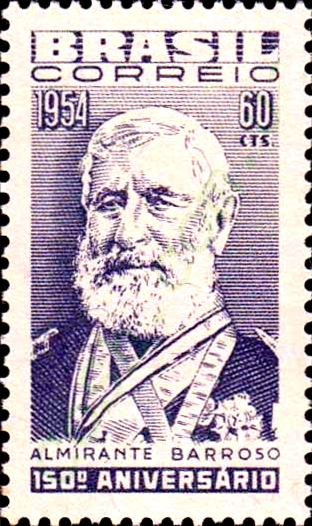 Almirante Barroso